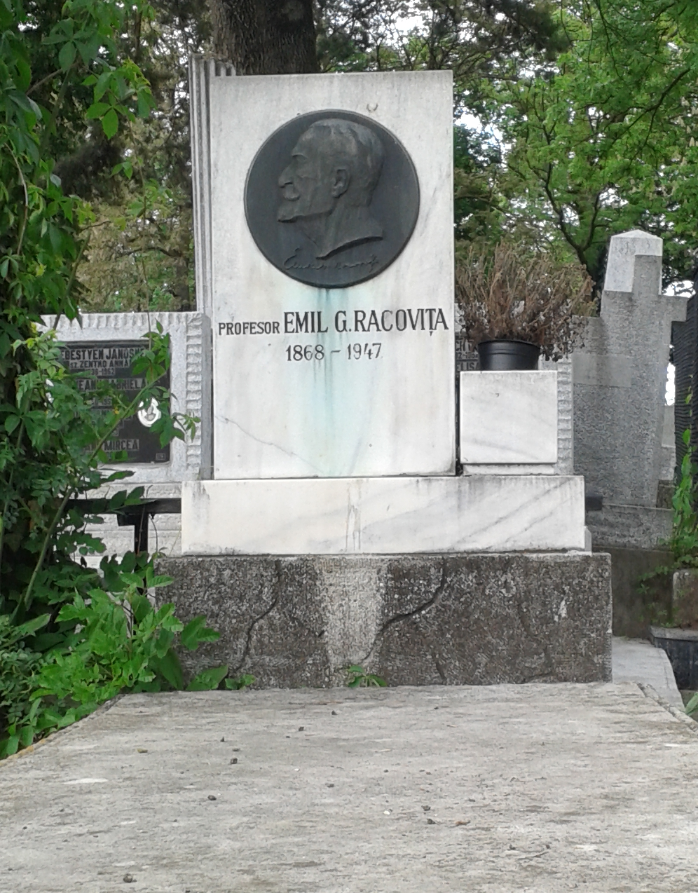 Cimitirul Central "Hajongard" Cluj Napoca Mormântul şi basorelieful lui Emil Racoviţă. 010